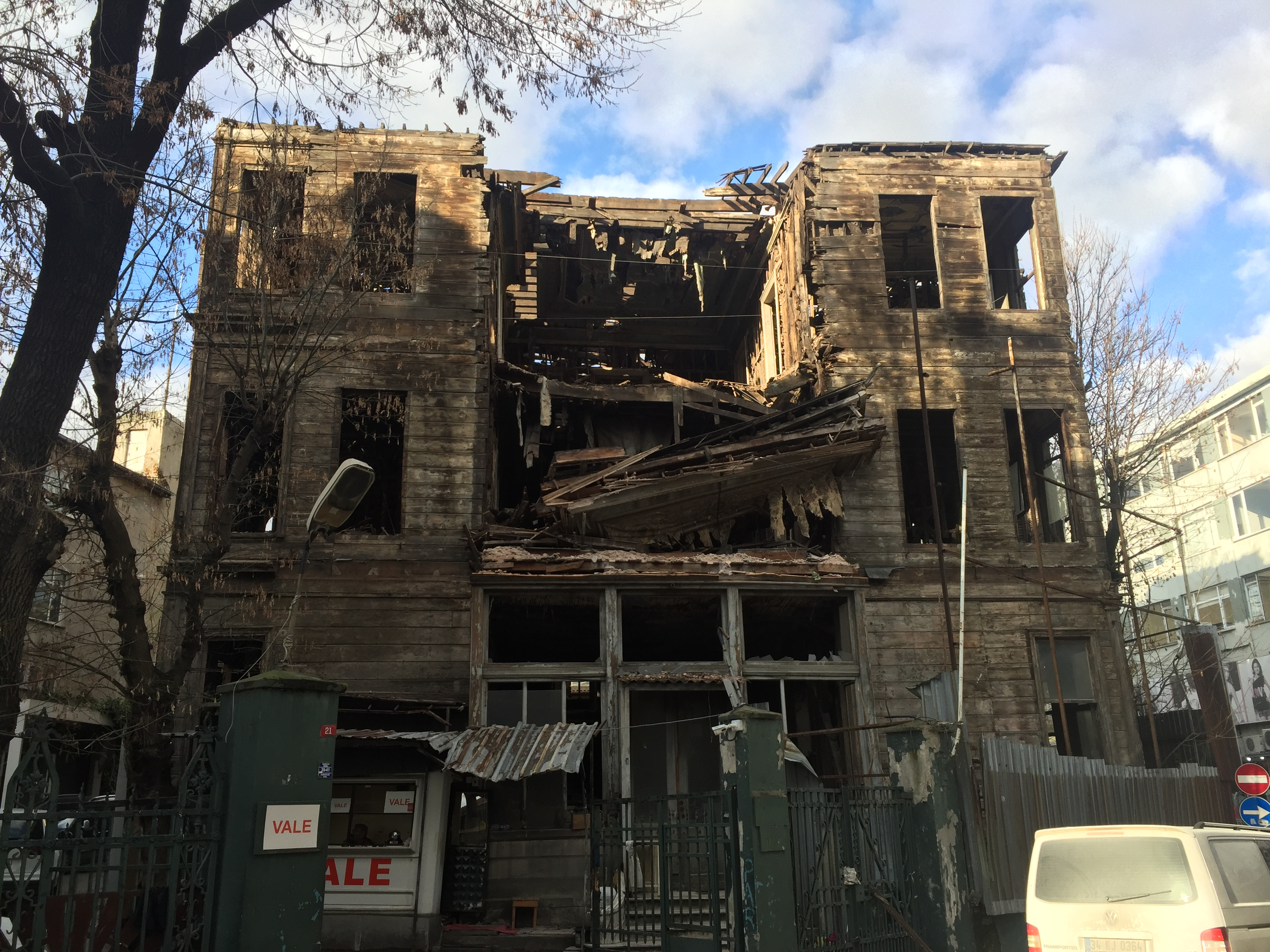 Pembe Konak, Cağaloğlu, İstanbul